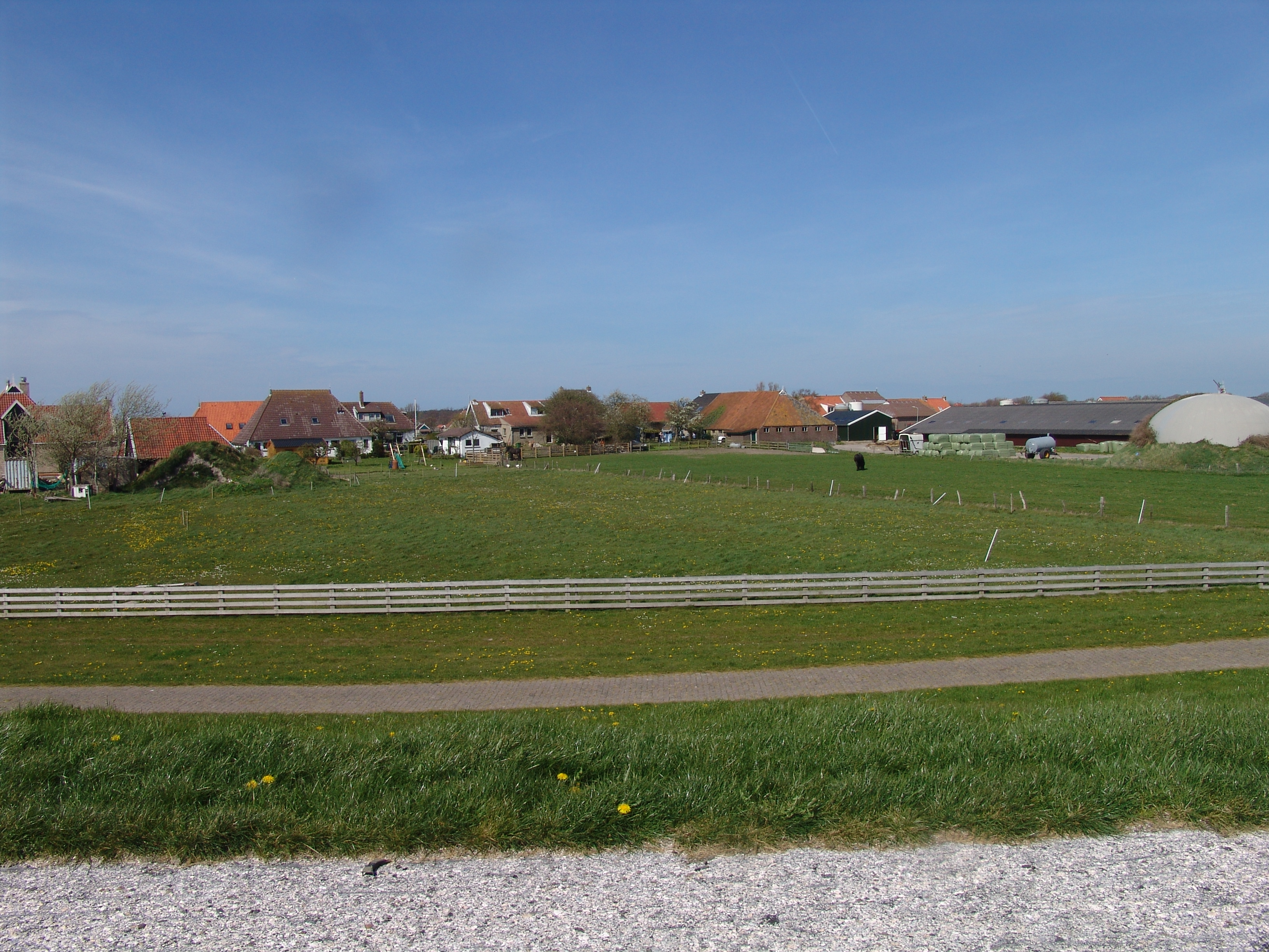 Kinnum vanaf de dijk gezien